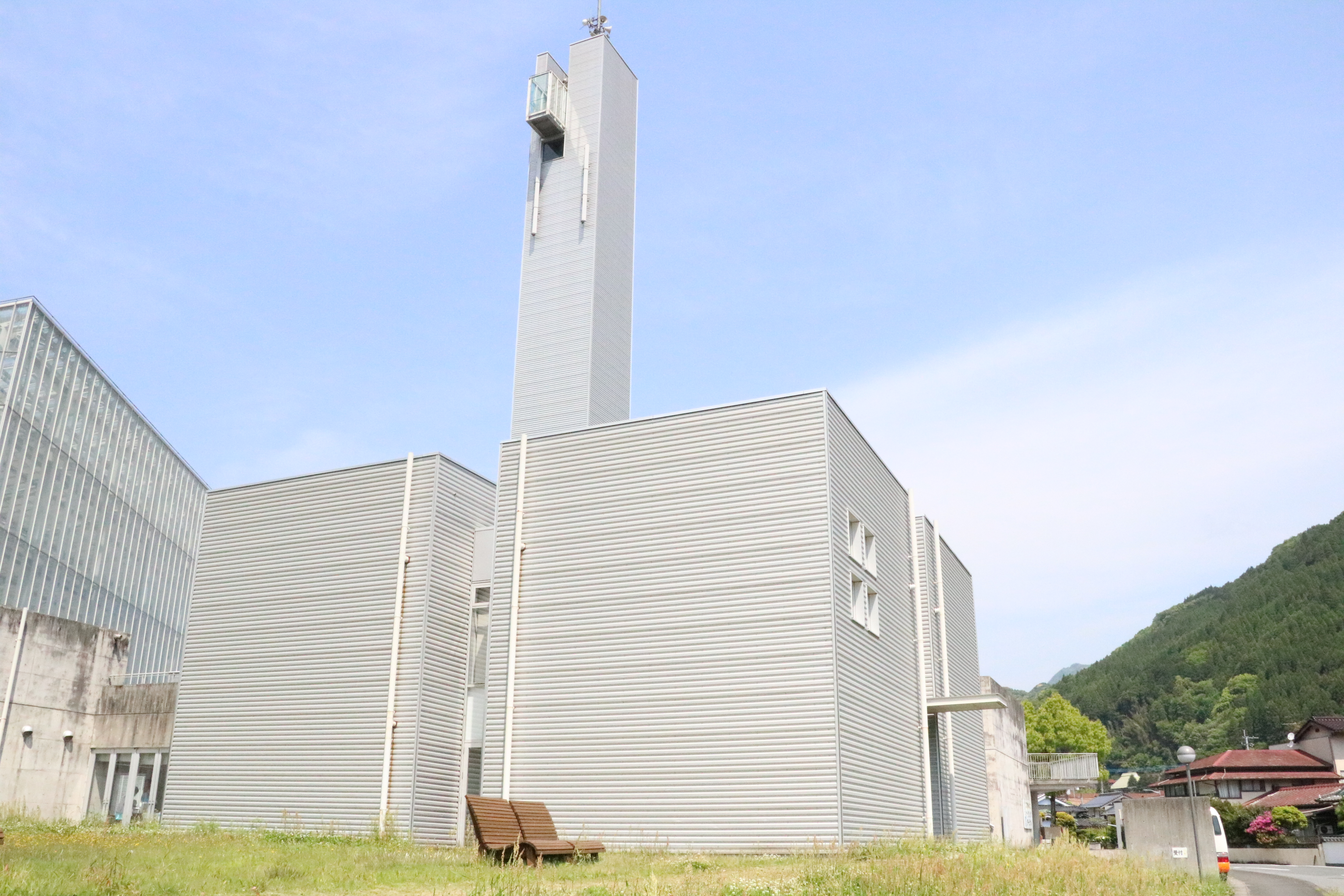 山の中に近代的な建物がありアンバランス加減が絶妙です。